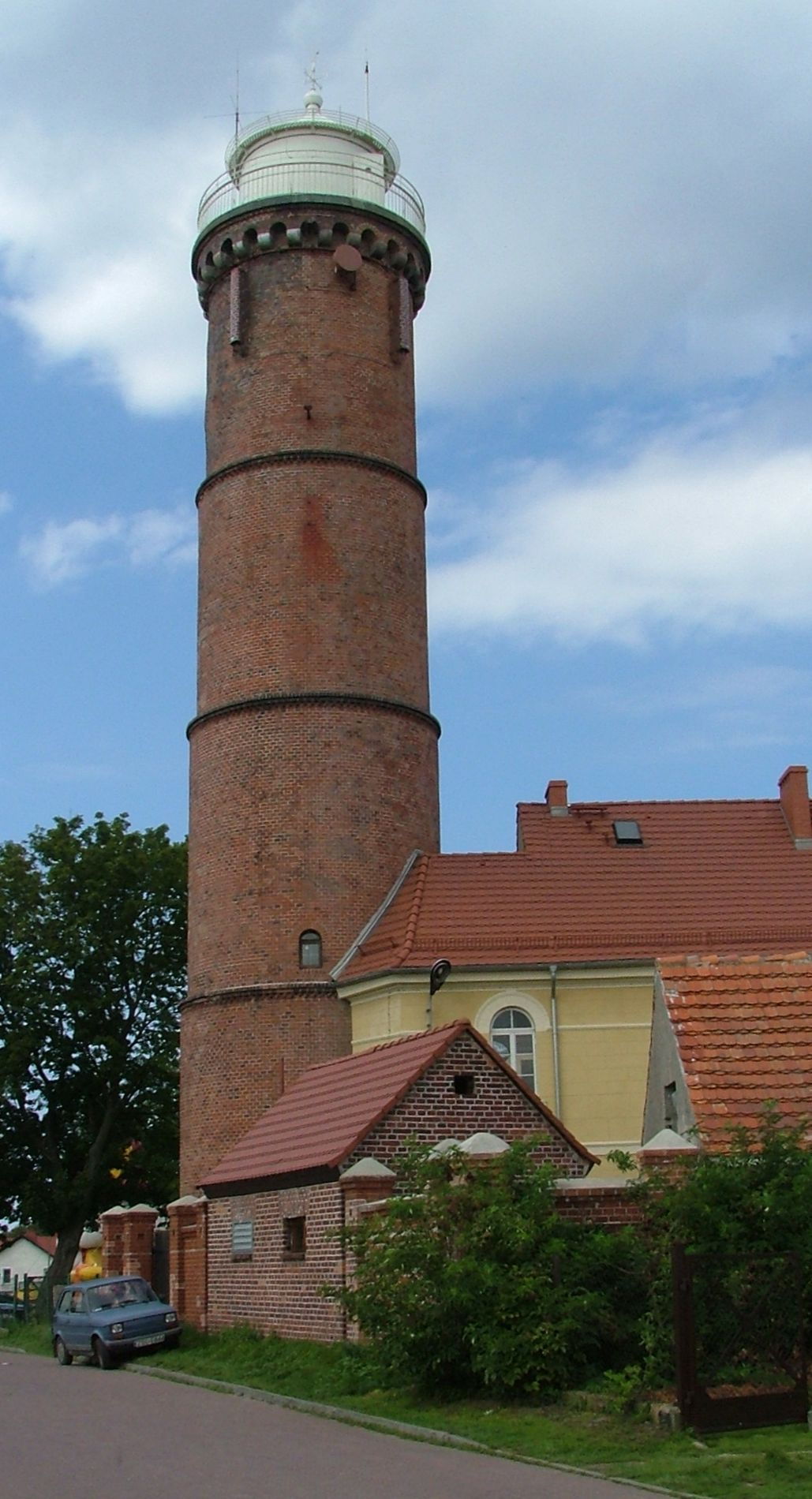 Jarosławiec (województwo zachodniopomorskie), latarnia morska